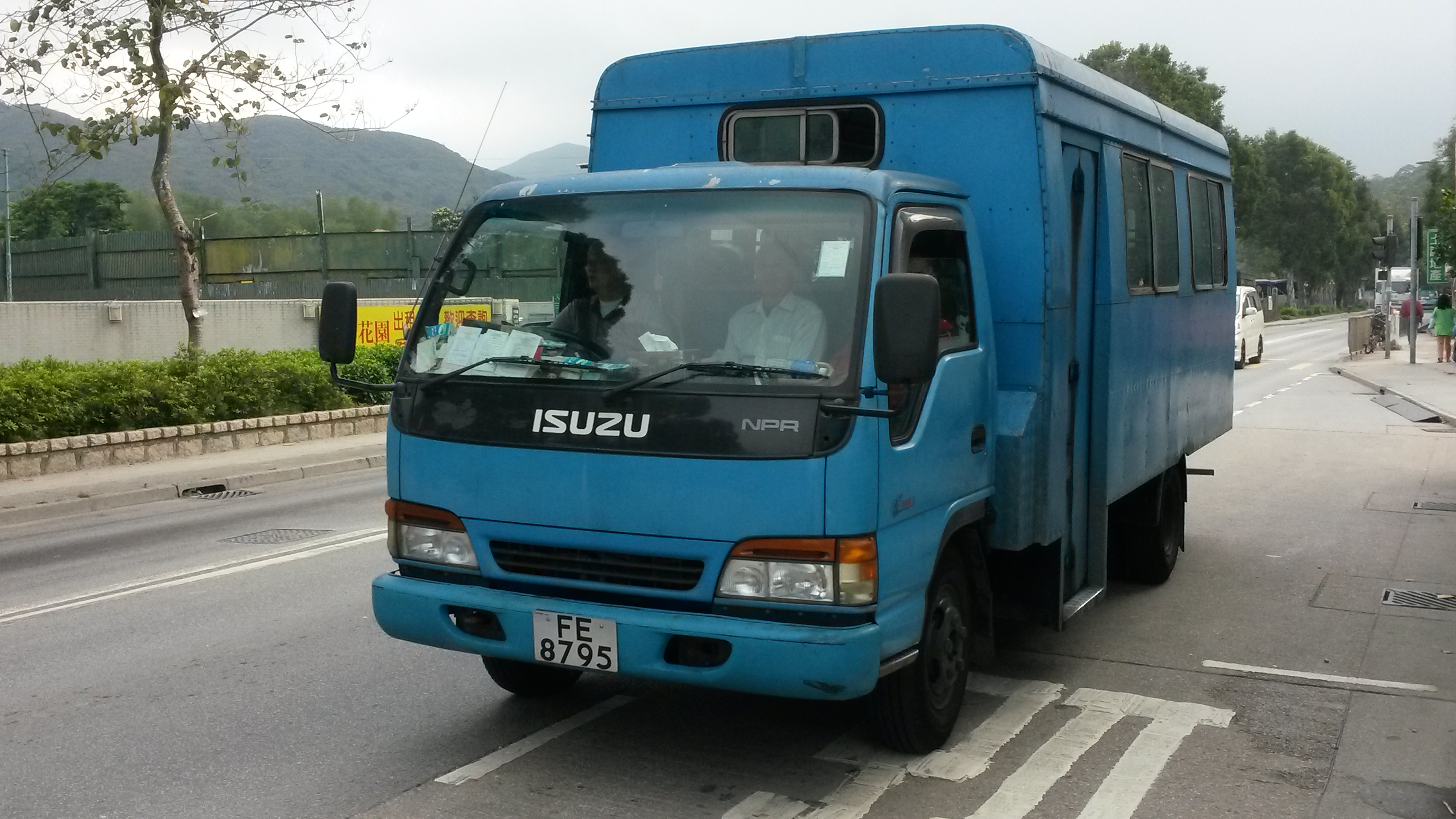 萬屋邊鄉村車